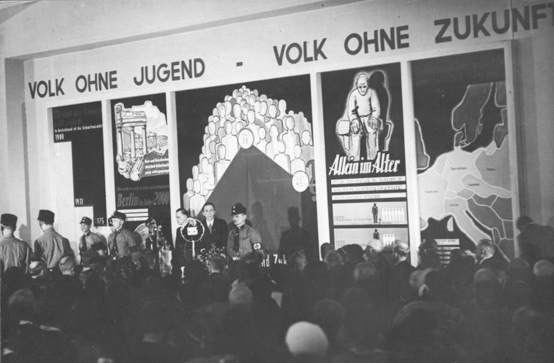 Die feierliche Eröffnung der großen Ausstellung "Die Frau" in den Ausstellungshallen am Kaiserdamm in Berlin! Reichsminister Dr. Goebbels bei seiner Eröffnungsansprache auf der Ausstellung "Die Frau".